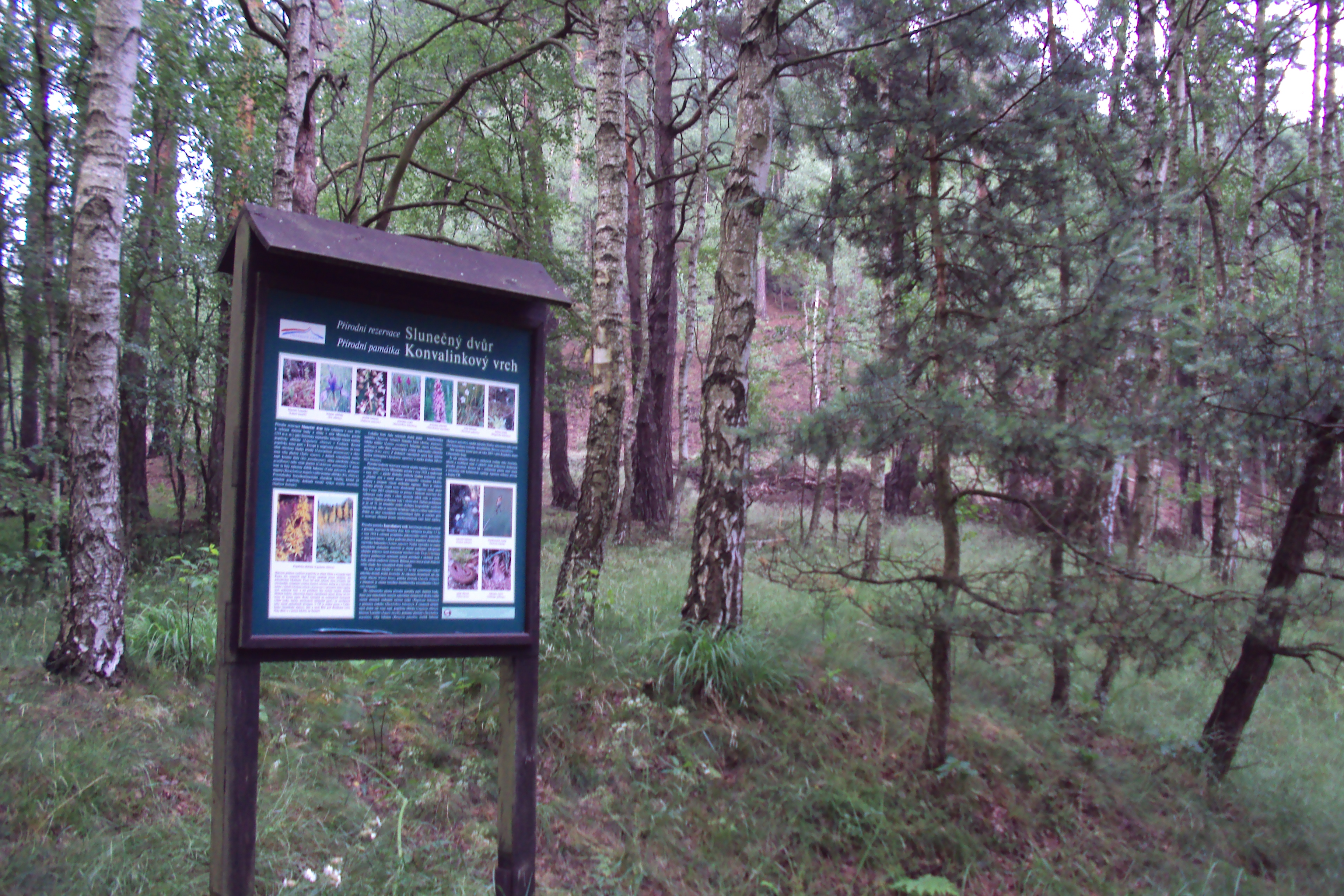 Tbbule označující jak louku rezervace Slunečný dvůr, tak památku v pozadí Konvalinkový vrch